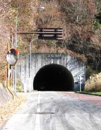 トンネルを道志から撮影したもの